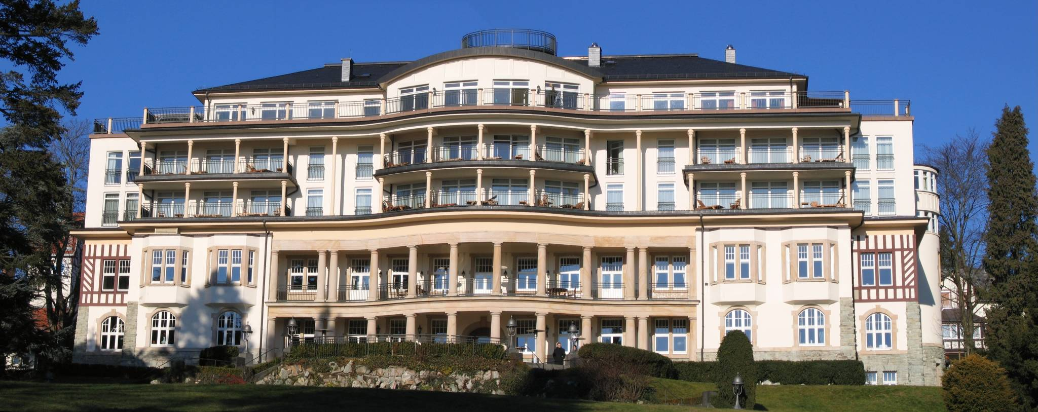 Hotel Kempinski in Königstein-Falkenstein (Taunus), selbst fotografiert, GNU-FDL. Das Gebäude wurde errichtet auf den Gelände der dafür abgerissenen Lungenheilanstalt des Dr. Peter Dettweiler